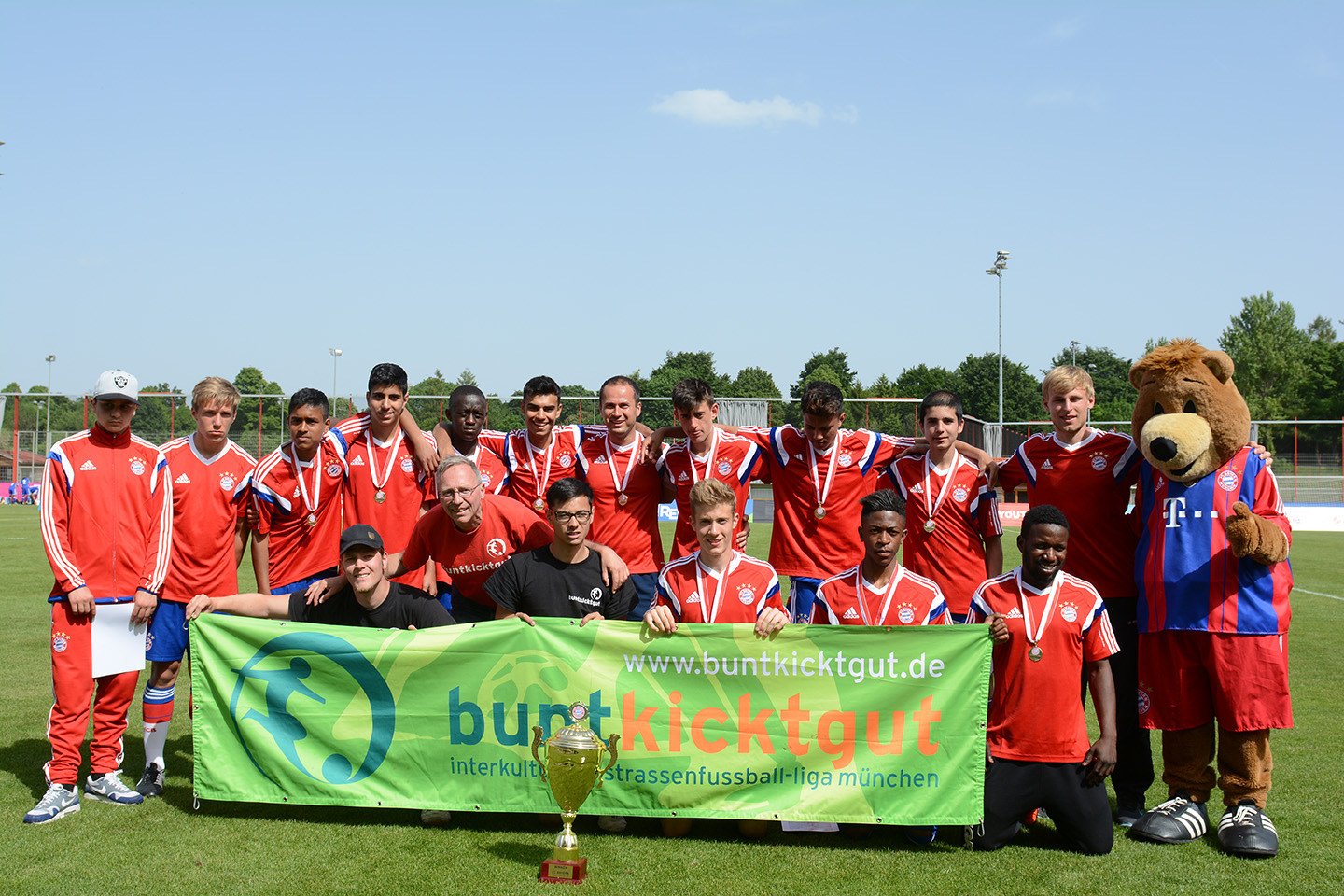 Das Auswahlteam von buntkicktgut wird Weltmeister als „Team Germany“ beim FC Bayern Youth Cup 2014.